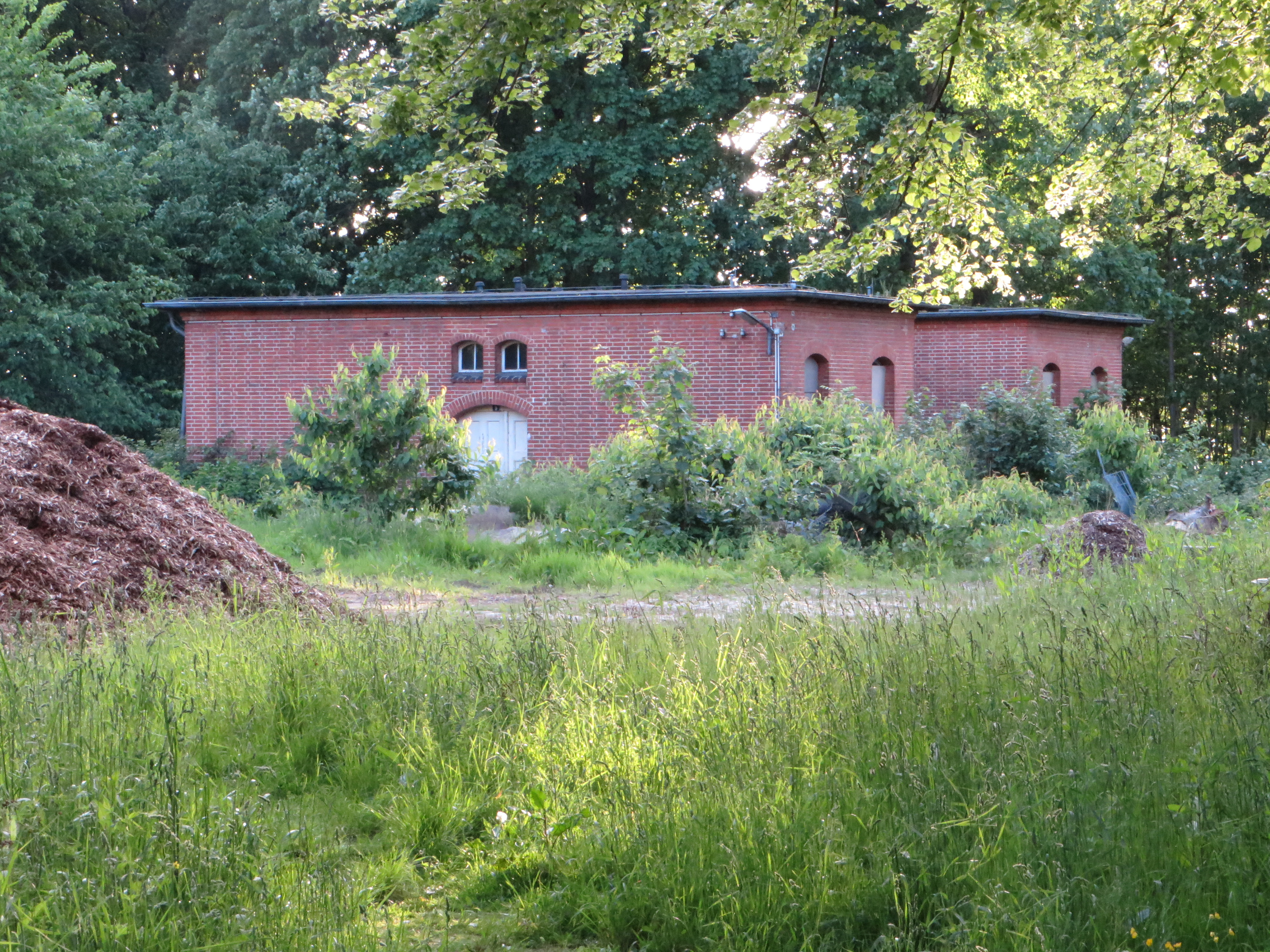 Absonderungshaus (Flensburg-Mürwik), Bild 03